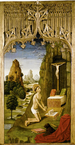 Sant Jeroni Penitent. Mestre de la Seu d'Urgell-MNAC